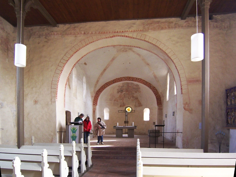 Kirche in Frauenmark, Landkreis Parchim